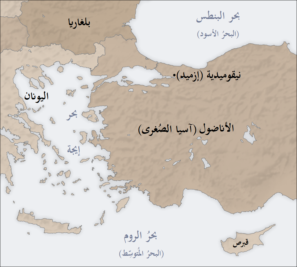 خارطة تُظهر موقع مدينة نيقوميدية القديمة (إزميد المُعاصرة) في الطرف الشمالي الغربي من الأناضول.